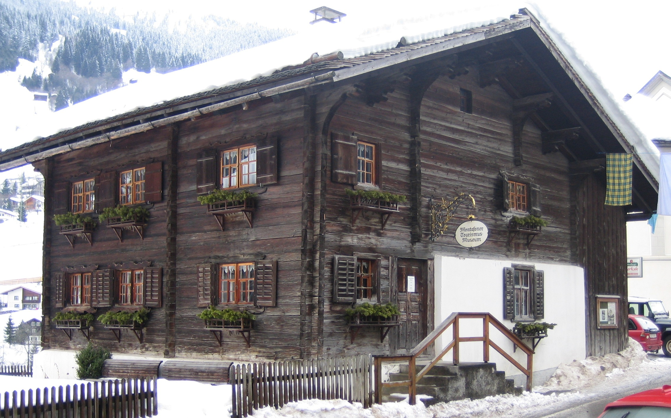 Wohnhaus, Ehemaliges Frühmeßhaus, Tourismusmuseum, Gaschurn